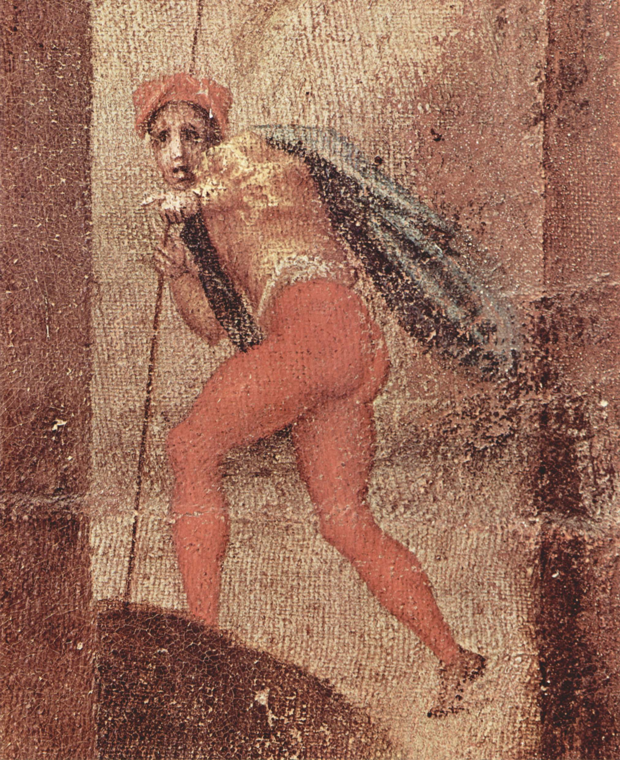 detail